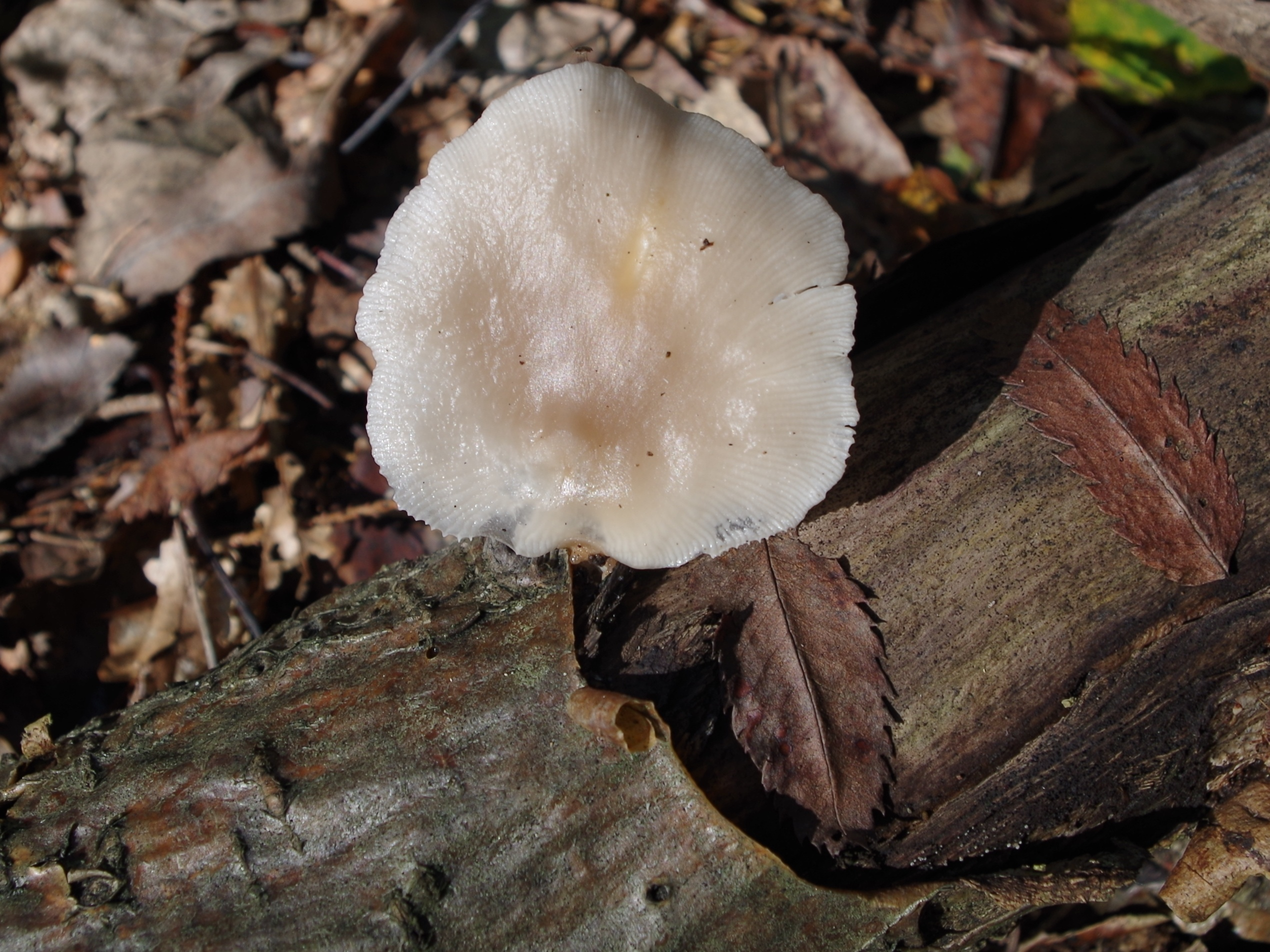 Panellus mitis (location: Poland, Leszczyna, województwo małopolskie)